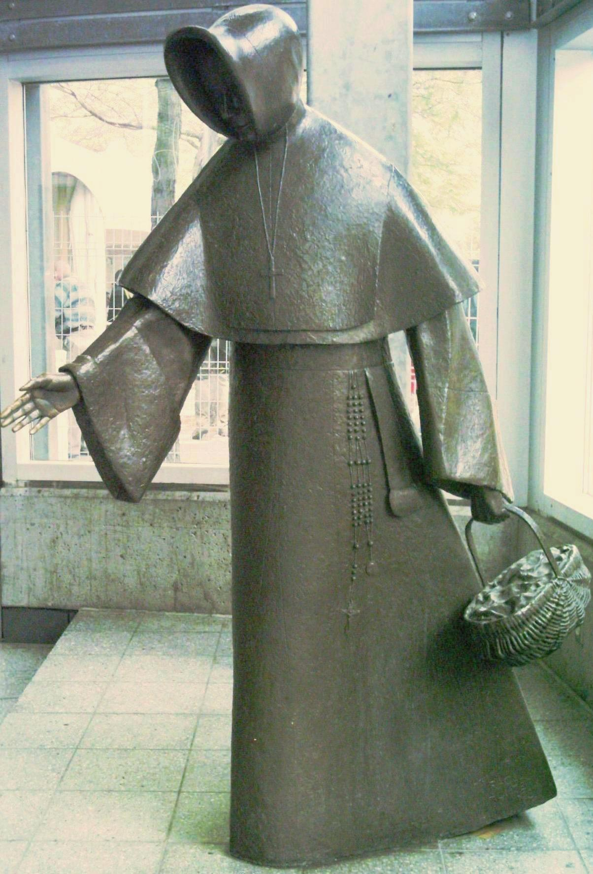 Mère Émilie Gamelin, sculpture de Raoul Hunter, située à la station de métro Berri-UQAM à Montréal.